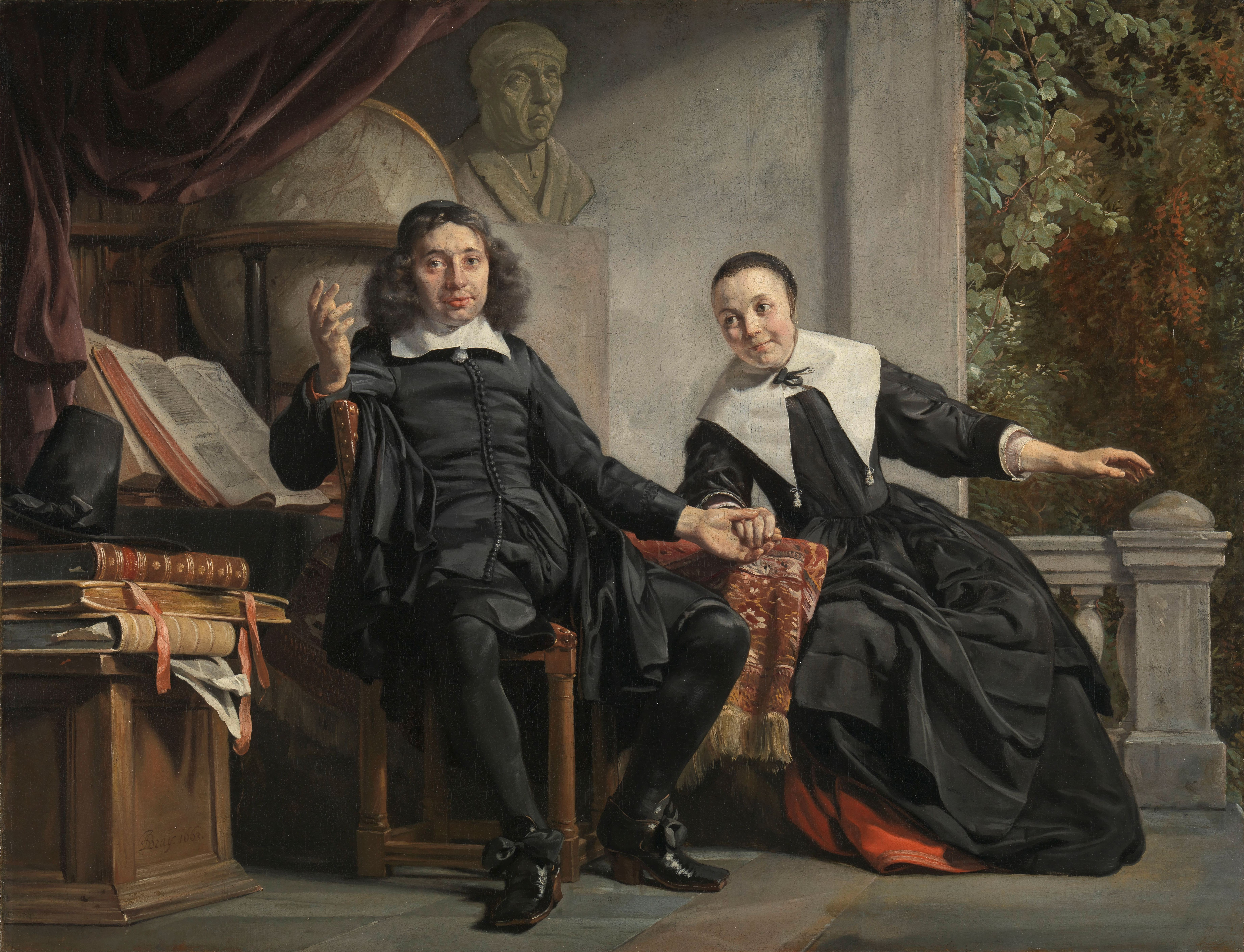 Portretten van de doopsgezinde Haarlemse drukker Abraham Casteleyn en zijn echtgenote Margarieta van Bancken. Ten voeten uit, zittend op een terras. Links een deel van een studeervertrek met boeken, een grote globe en een portretbuste van Laurens Jansz. Coster.; Jan de Bray (ca. 1627–1697), olieverf op doek, 1663